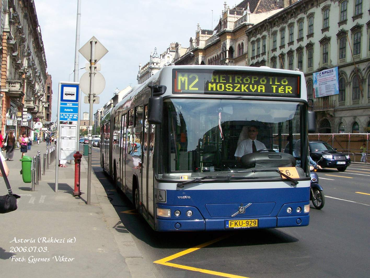 M2-es metrópótló busz Budapesten, Volvo 7700A